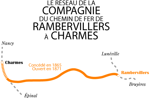 Carte du réseau de la compagnie du chemin de fer de Rambervillers à Charmes (1865-1938), dessinée par moi-même pour l'article éponyme.